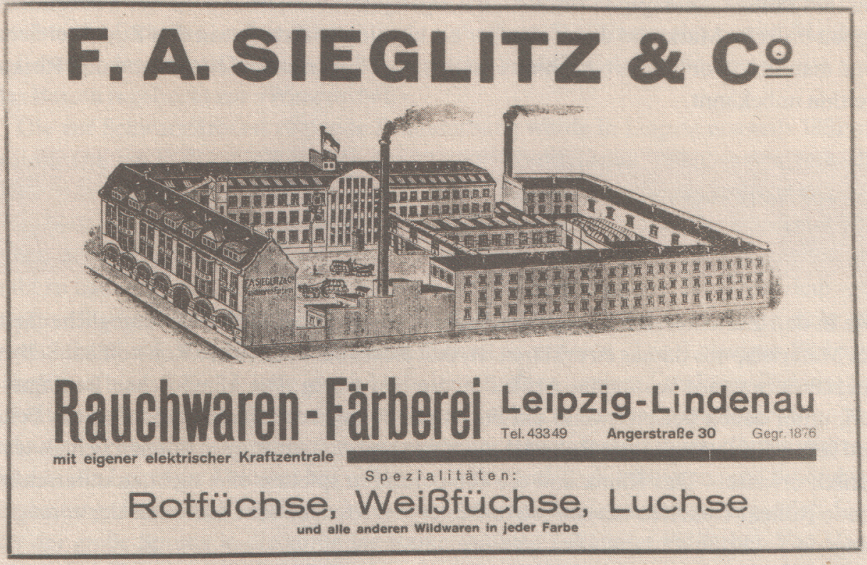 F. A. Sieglitz & Co., Rauchwaren-Färberei, Leipzig-Lindenau. Anzeige in der Zeitschrift „Pelzhandel“ von 1905.